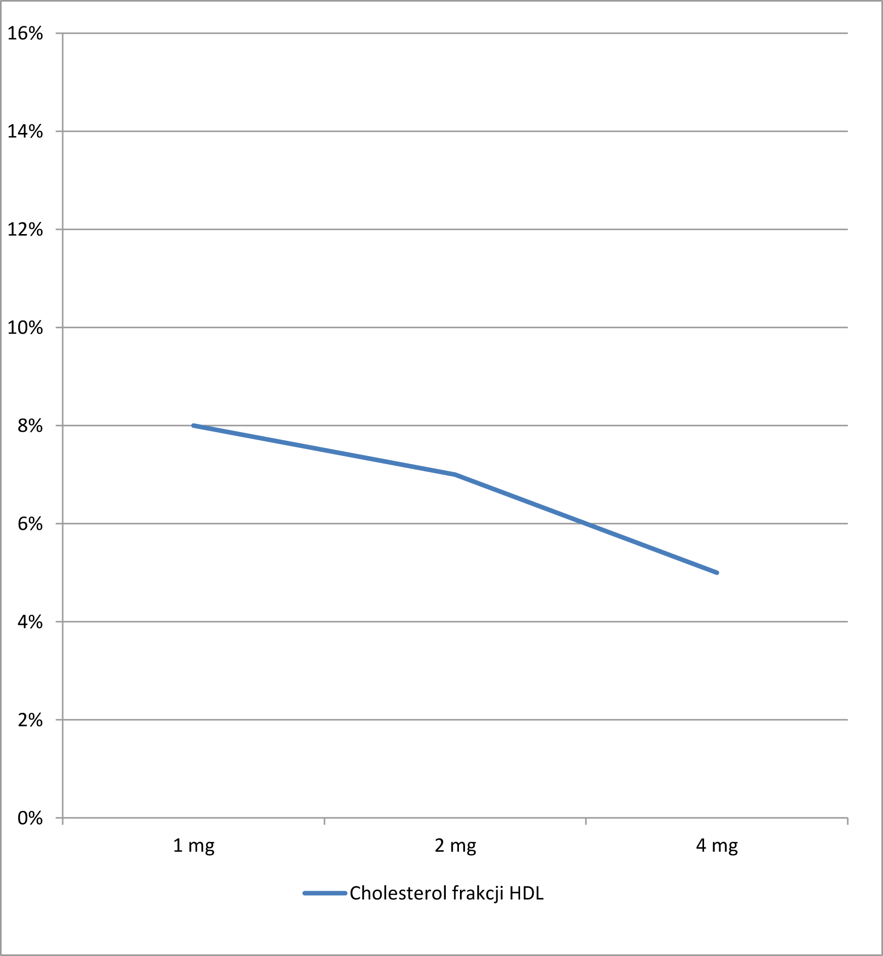 Wpływ pitawastatyny na wskaźniki lipidowe (dane do wykresu za LIVALO (pitavastatin) Tablet, Film Coated for Oral use)